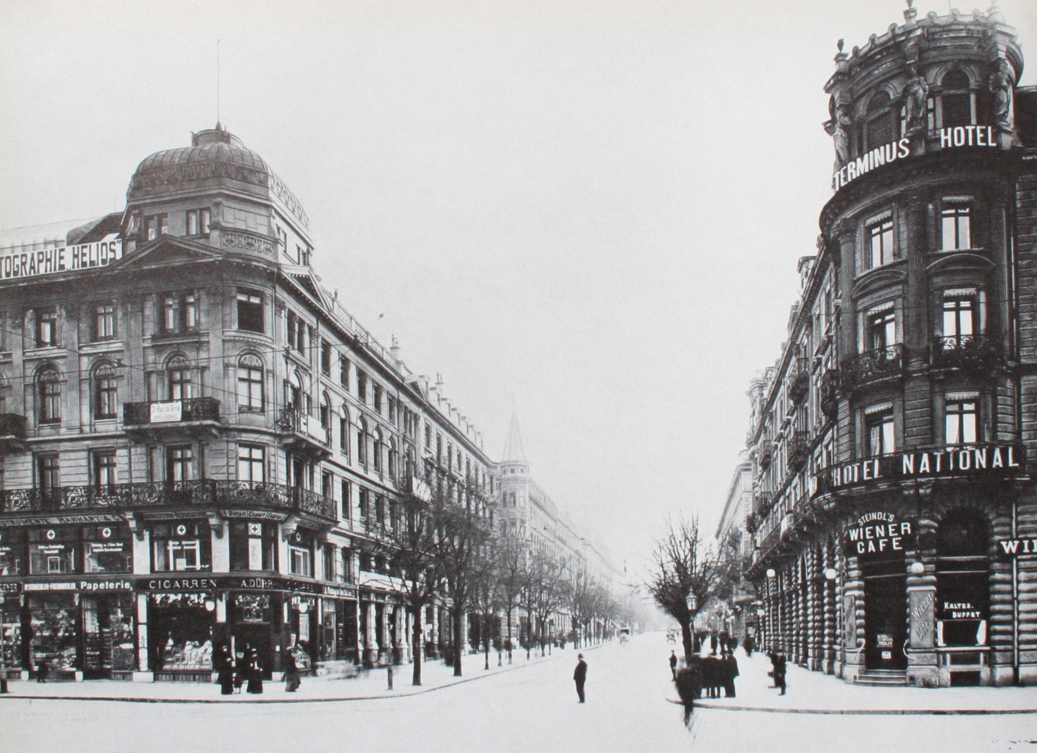 Untere Bahnhofstrasse um 1920 vom Bahnhof Richtung Süden